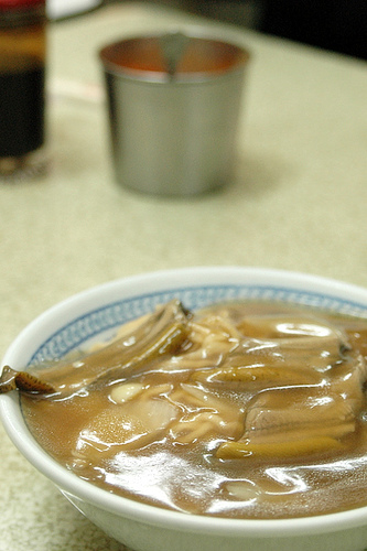 炒鱔魚意麵,阿鐵炒鱔魚,台南市西門路二段352號